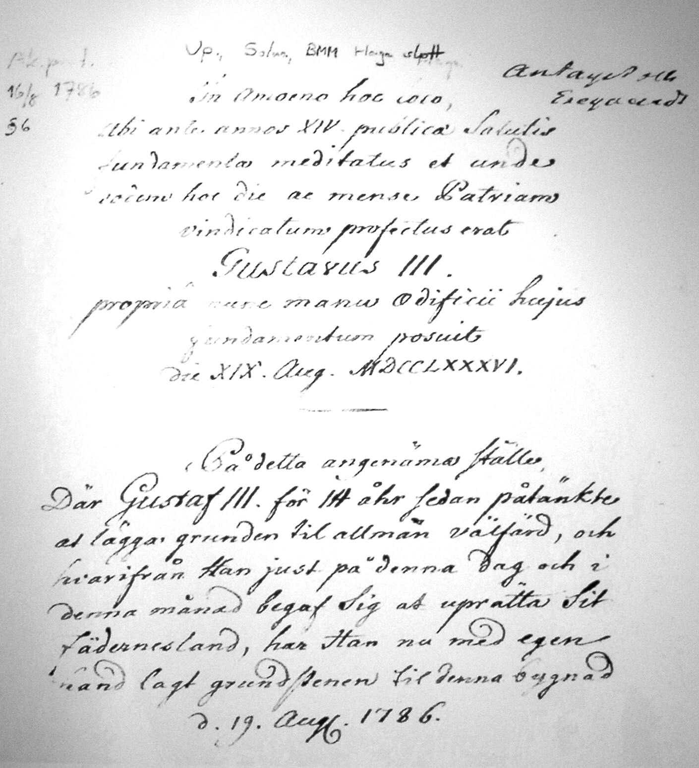 Gustav III grundläggningsdokument till Stora Haga slott. Textens 2:a avsnitt lyder: "På detta angenäma ställe, Där Gustav III för 14 åhr sedan påtänkte at lägga grunden til allmän välfärd, och hvarifrån Han just på denna dag och i denn månat begaf Sig at uprätta Sit fädernesland, har Han nu med egen hand lagt grundstenen til denna bygnad. d. 19. aug. 1786"